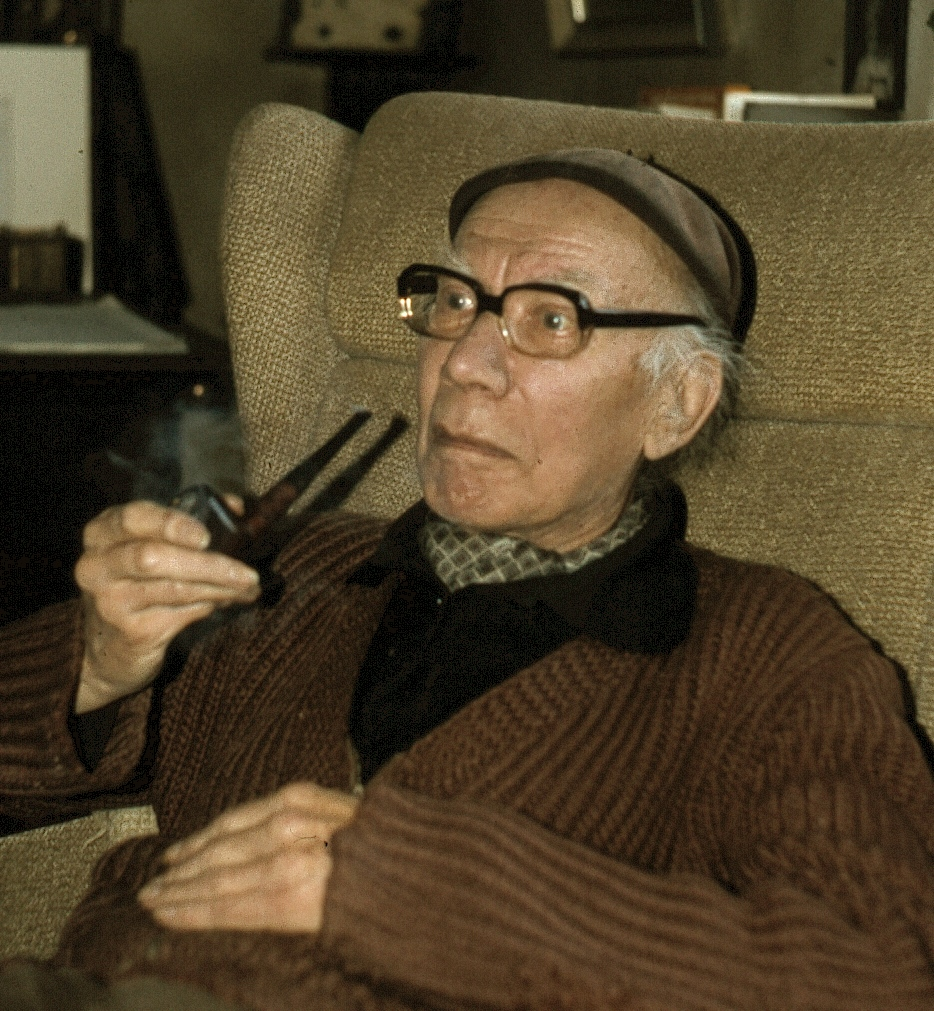 Hans Holtorf, Frühjahr 1980 Autor: Karl Nielsen